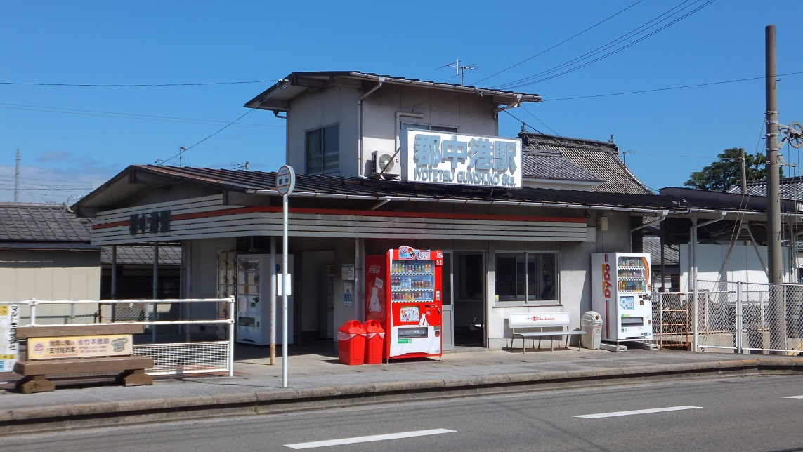 伊予鉄道 郡中港駅